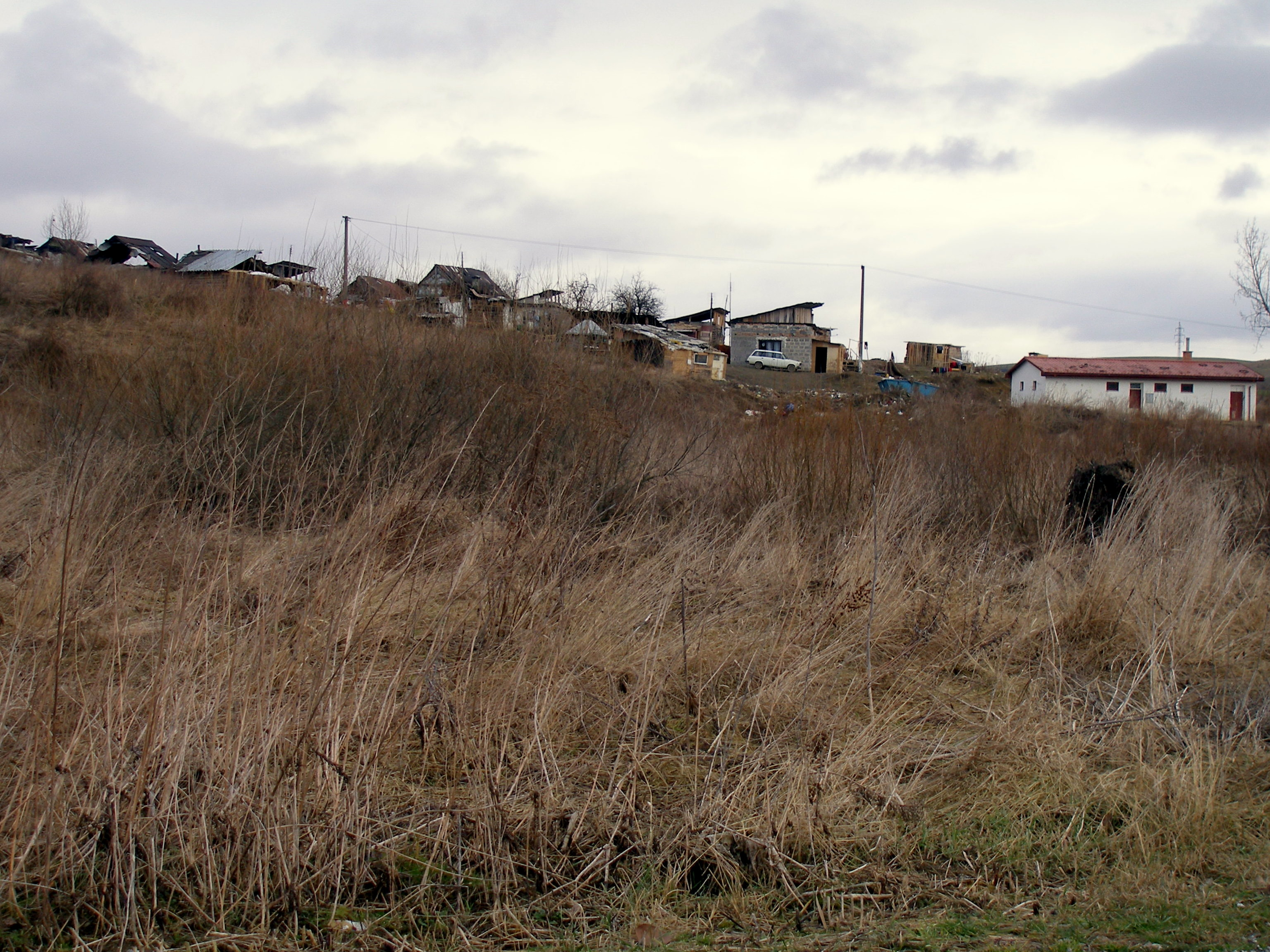 Rómska osada pri obci Torysa okres Sabinov región Šariš